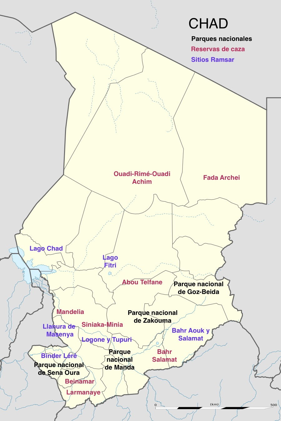 Mapa de Chad de áreas protegidas